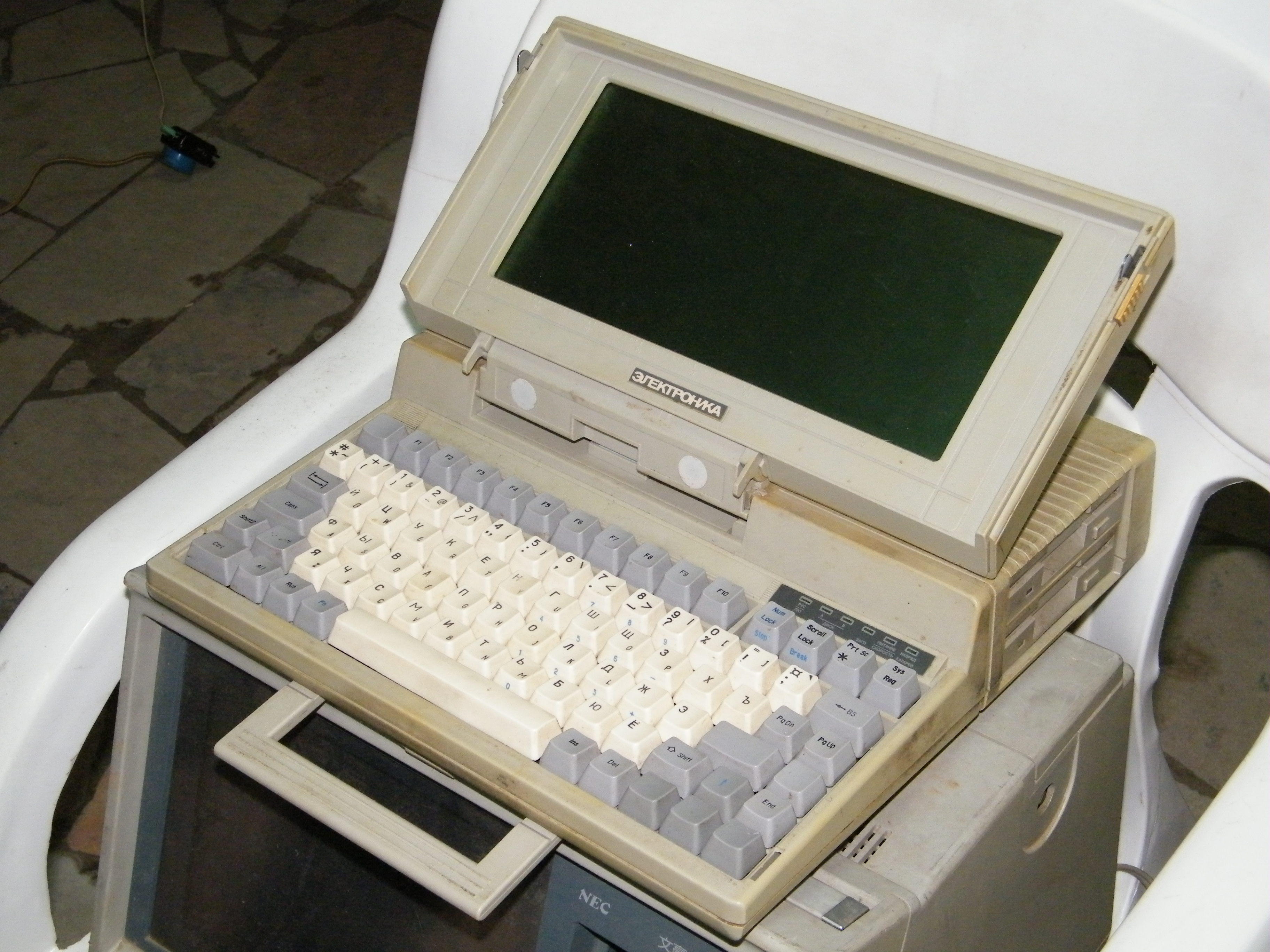 Теплый ламповый звук